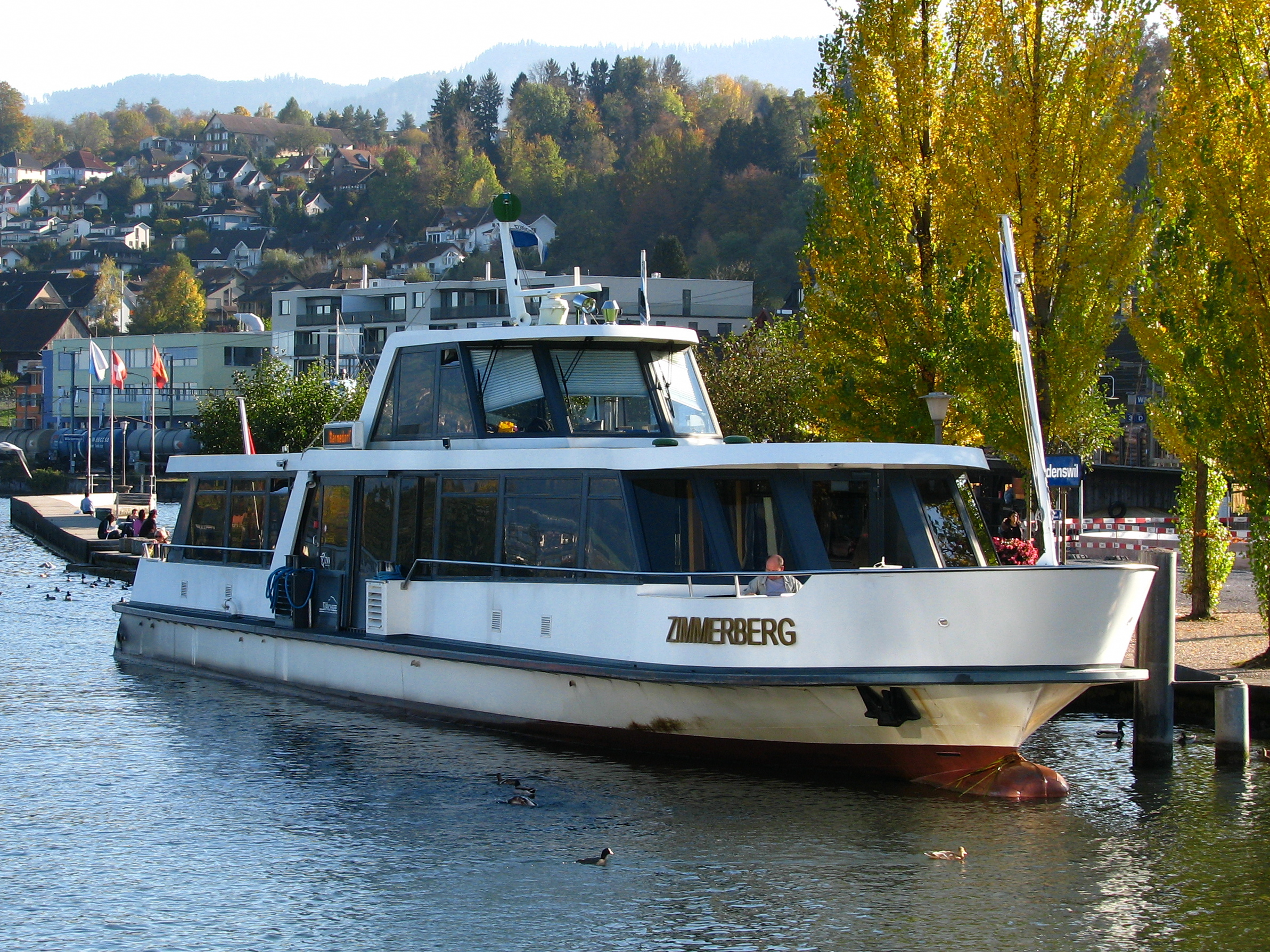 Zürichsee-Schiffahrtsgesellschaft (ZSG) motor ship MS Zimmerberg on Zürichsee (Lake Zürich) at Wädenswil harbour, Wädenswil train station in the background.